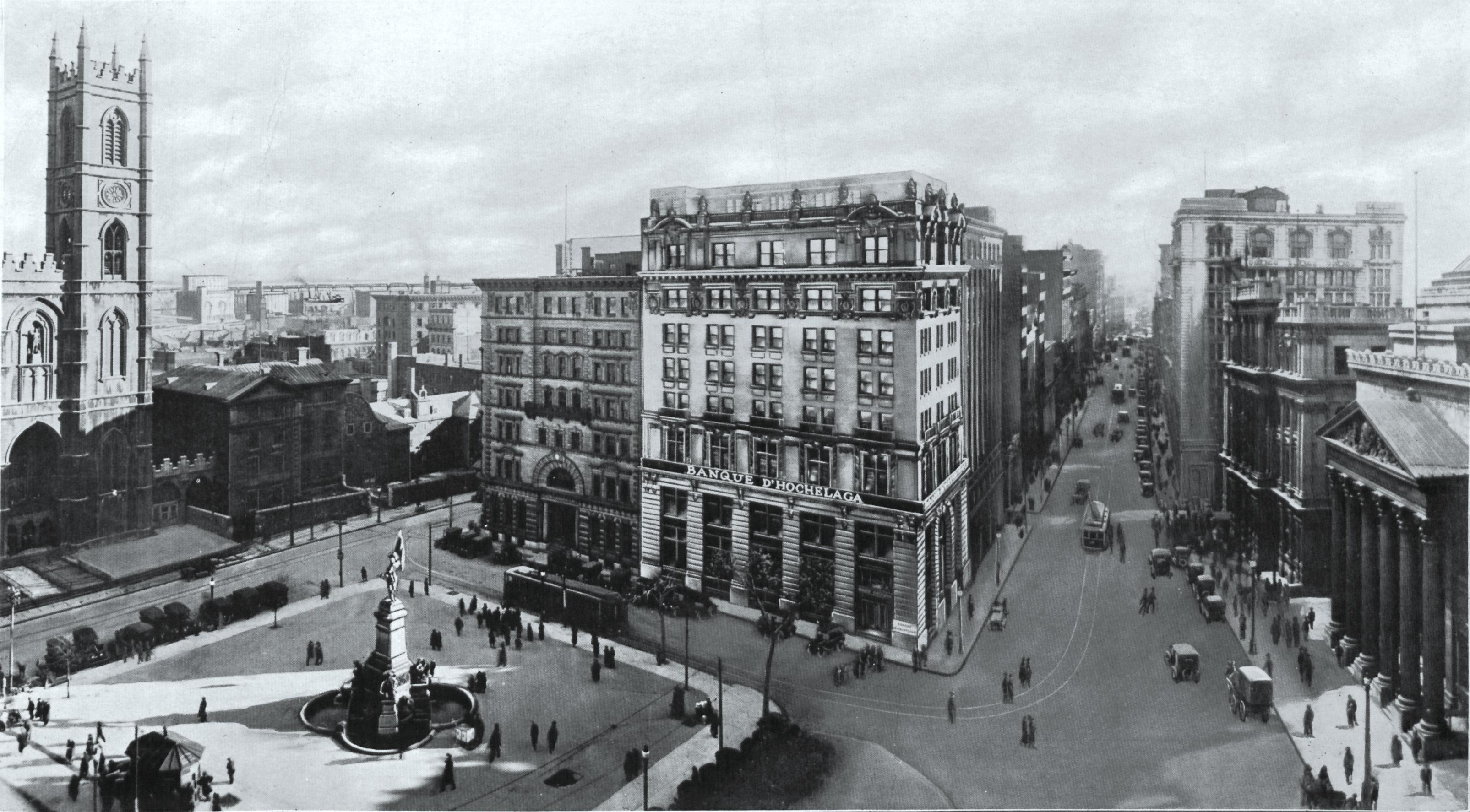 [Banque d'Hochelaga, ?Montreal.]. Half-tone reproduction of a photograph looking across the square towards the bank.